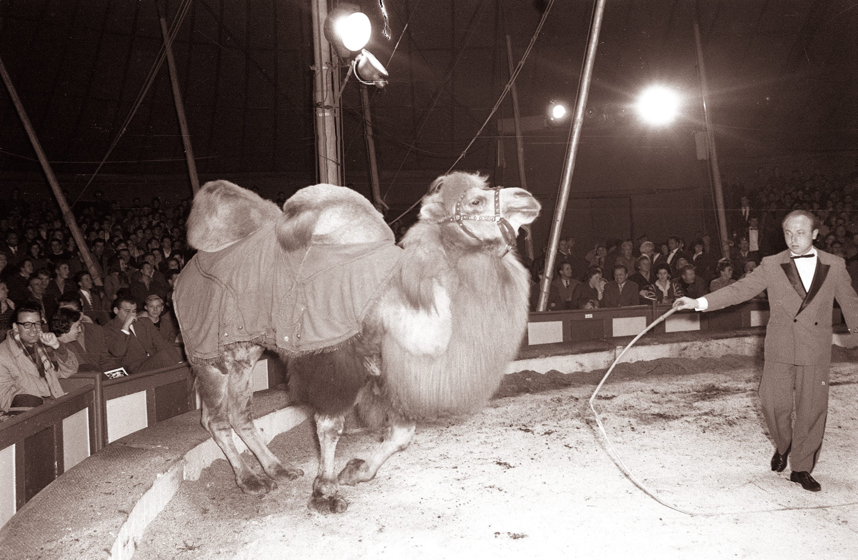 Otvoritvena predstava cirkusa Busch v Mariboru